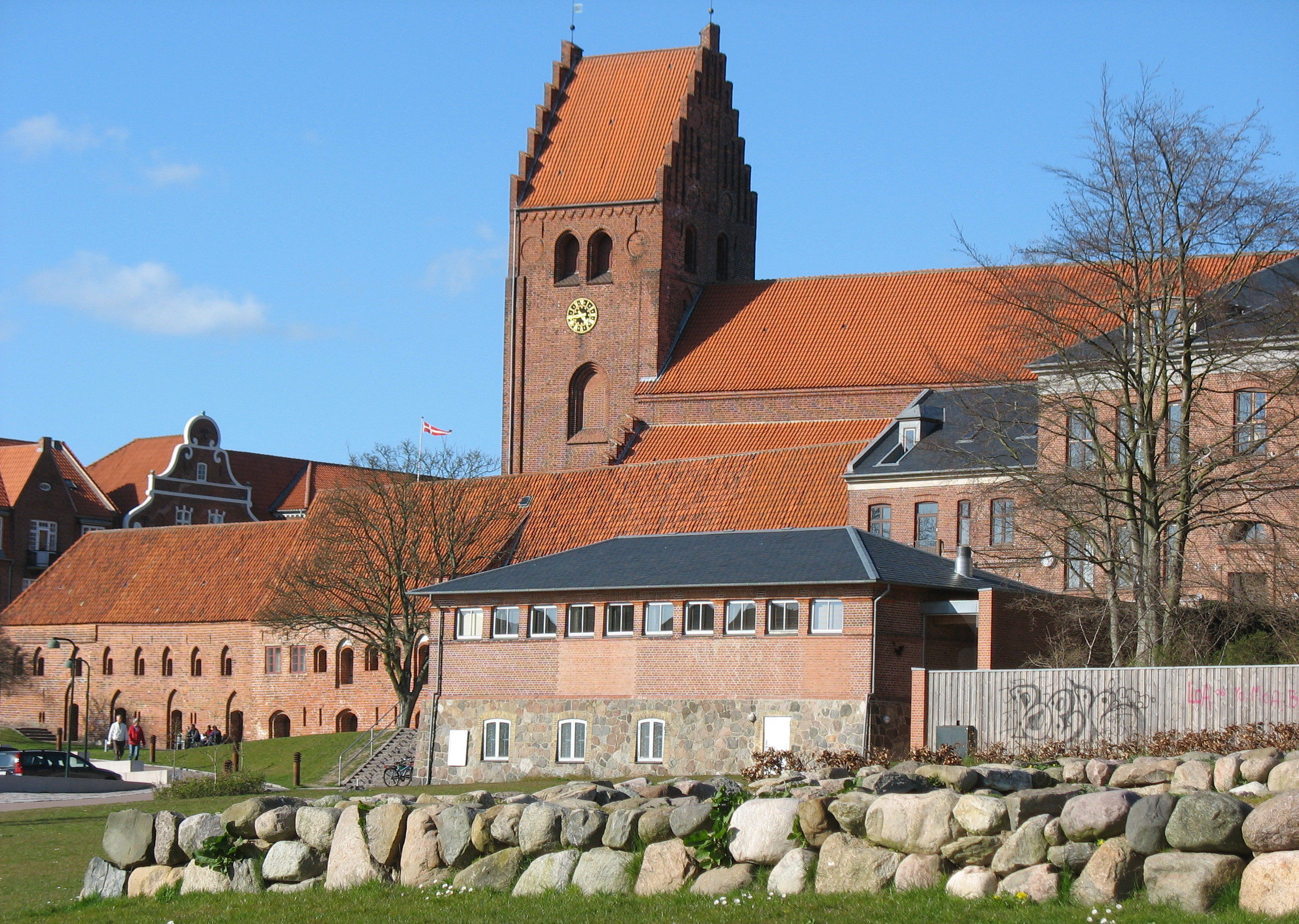 Skt. Peders Kirke - Næstved. Boderne foran kirken til venstre.